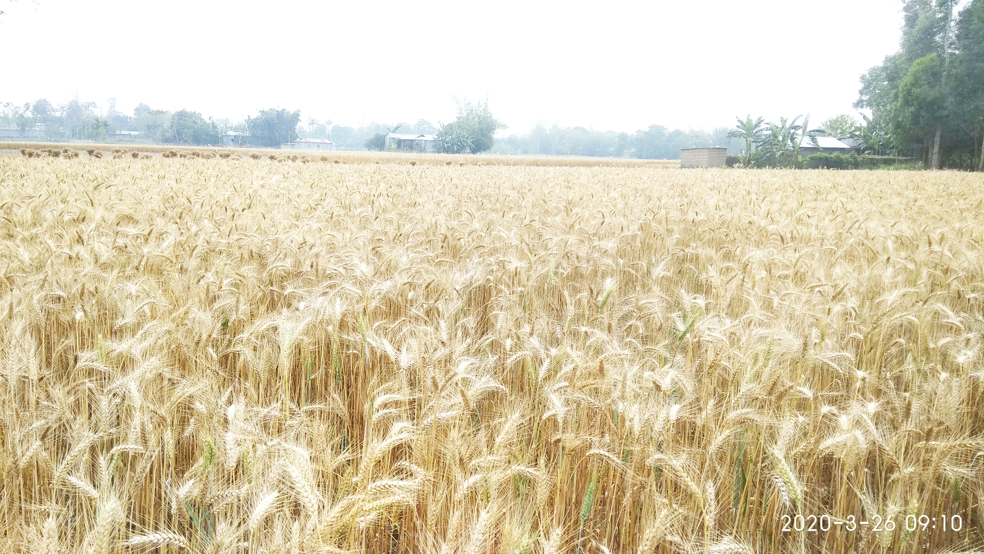 অসমীয়া: এই চিত্ৰ খনত বৰকলীয়া গাঁৱৰ কেতি-বাতিসমূহৰ বিৱৰণ দিয়া হৈছে।